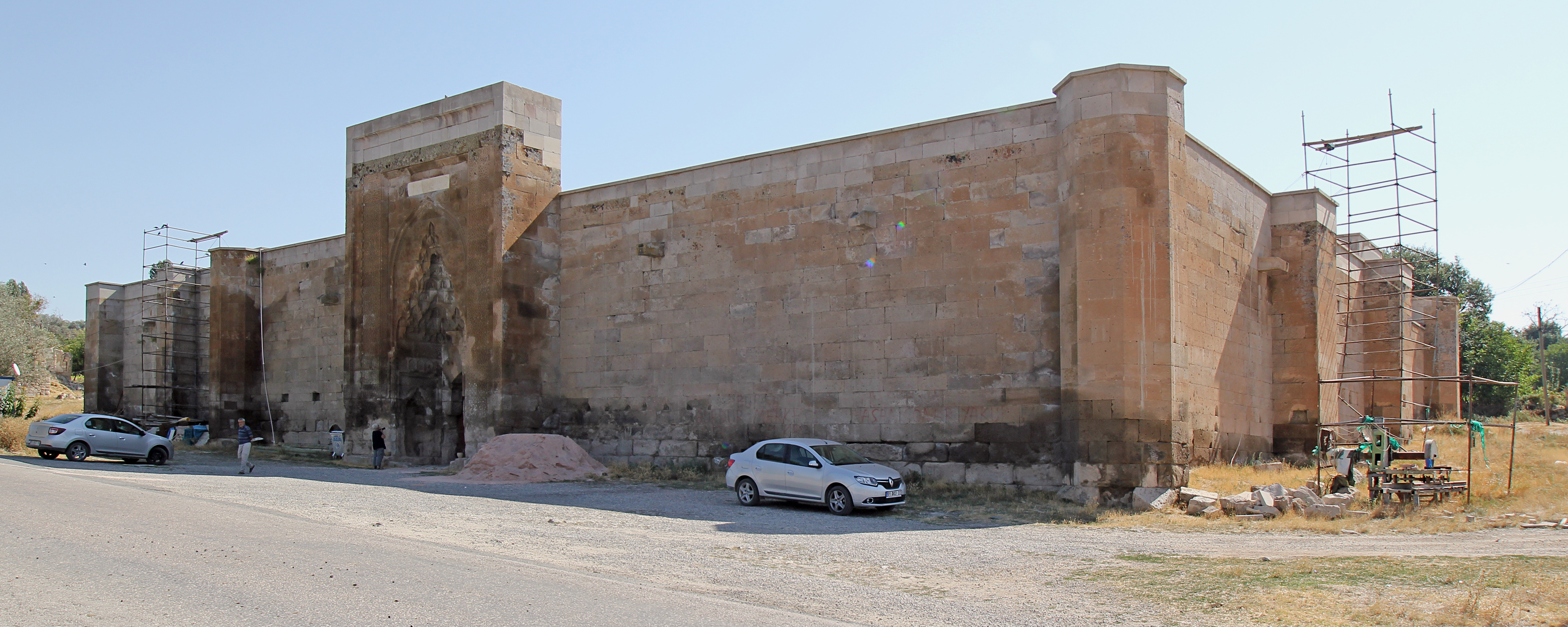 Ağzıkarahan, seldschukische Karawanserei nahe Aksaray, Türkei